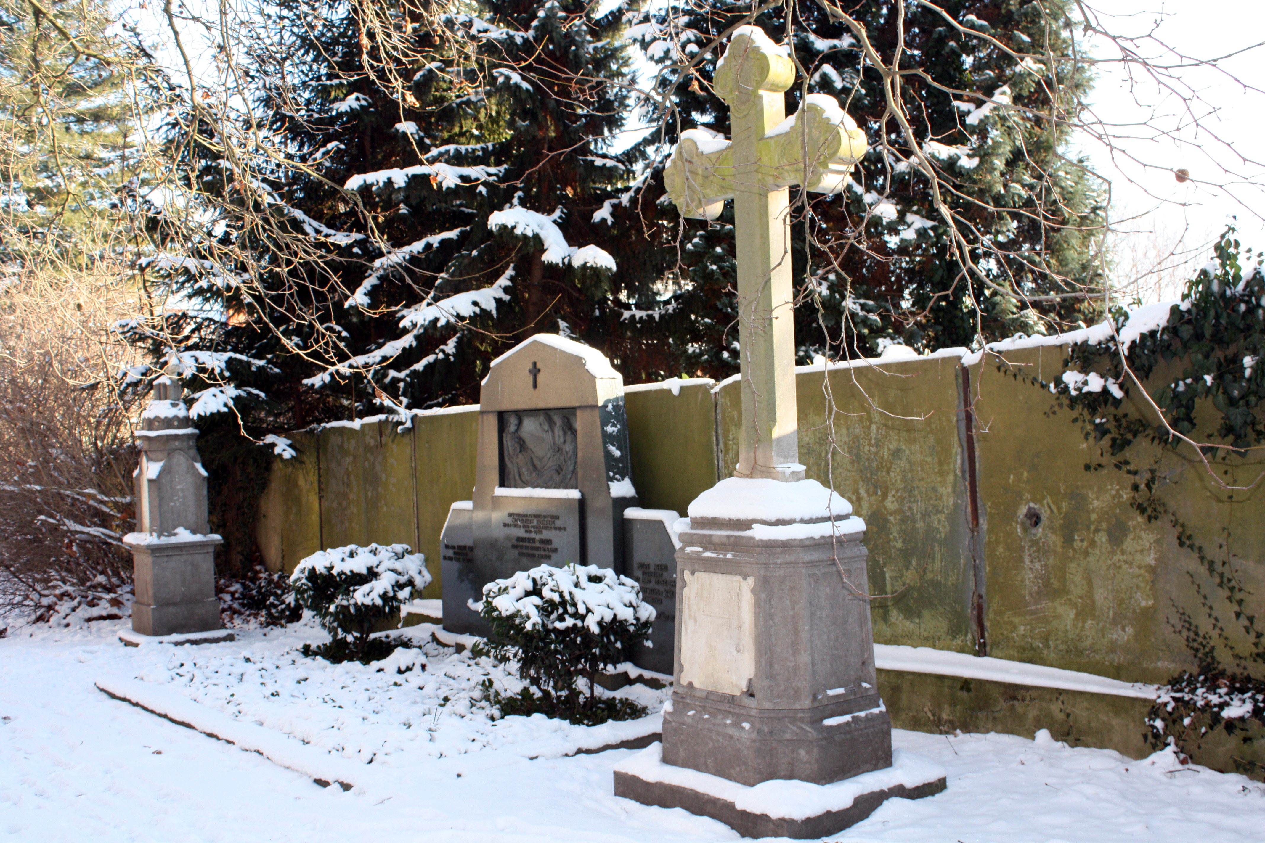 Hürth-Gleuel, Grablage von Burgbesitzern jüngerer Zeit